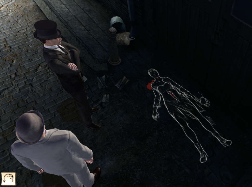 Capture d'écran du jeu Sherlock Holmes contre Jack l'Éventreur. Ici, on aperçoit Holmes et Watson devant la silhouette de Mary Ann Nichols, première victime du tueur.